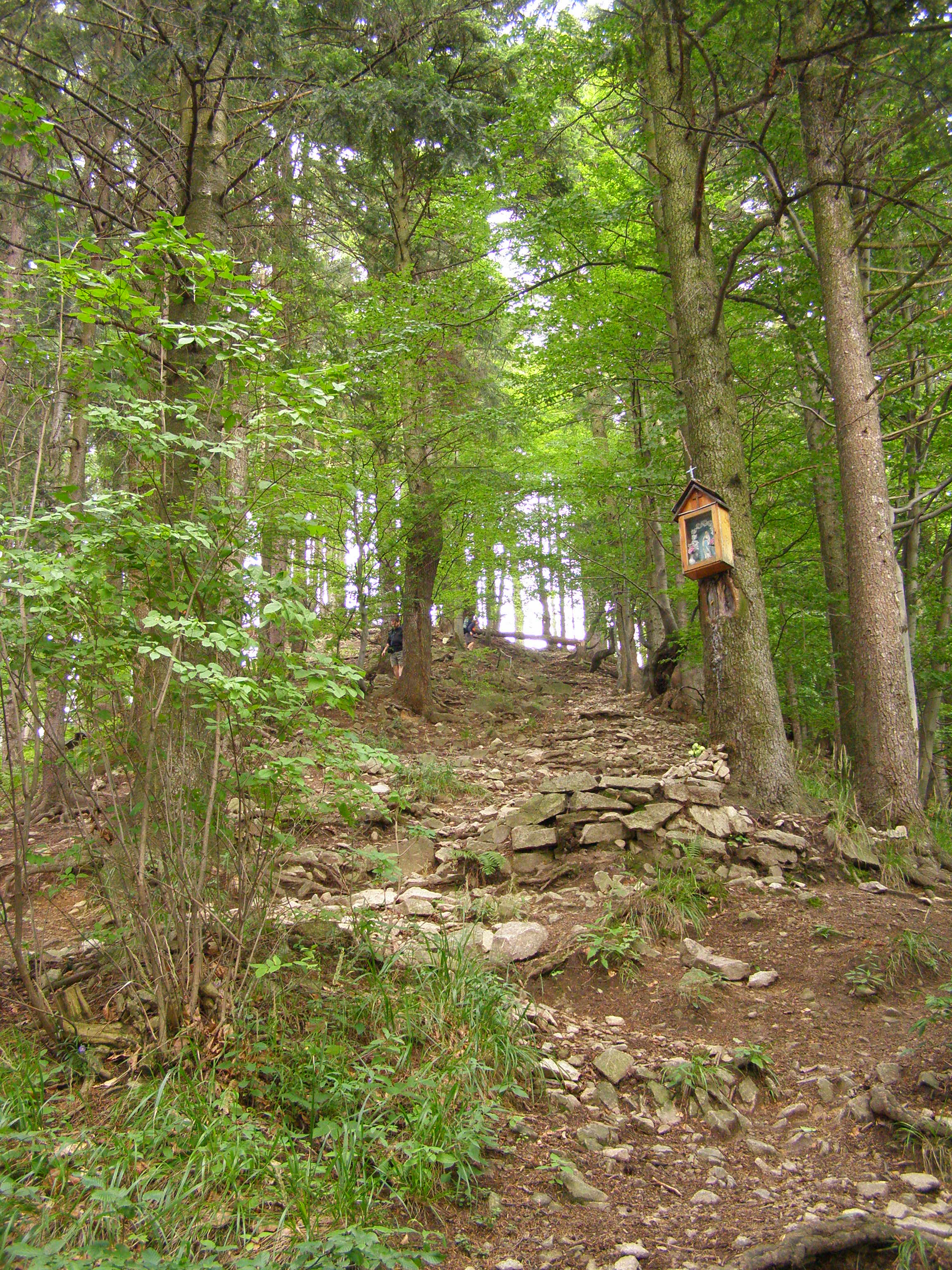 Krivánská Malá Fatra, NPR Starý hrad